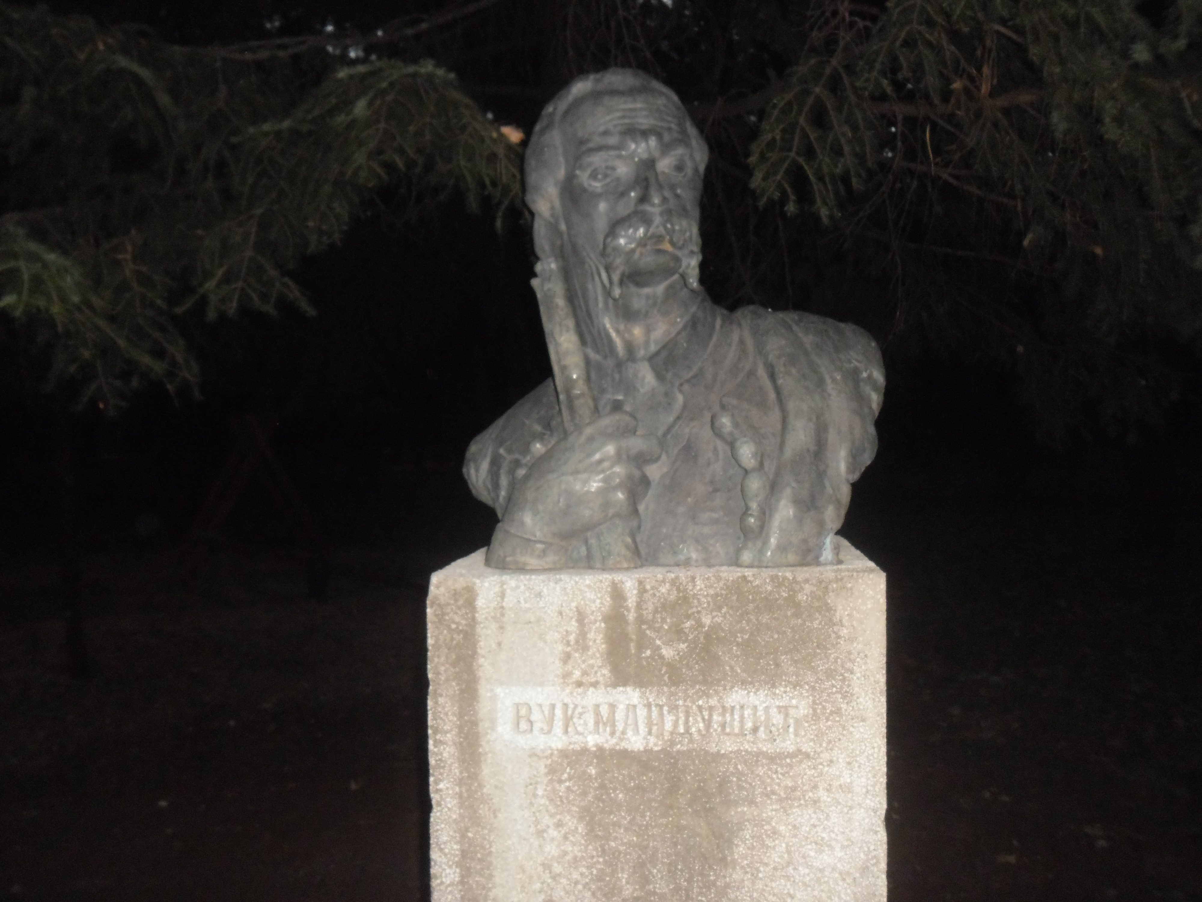 Cetinje